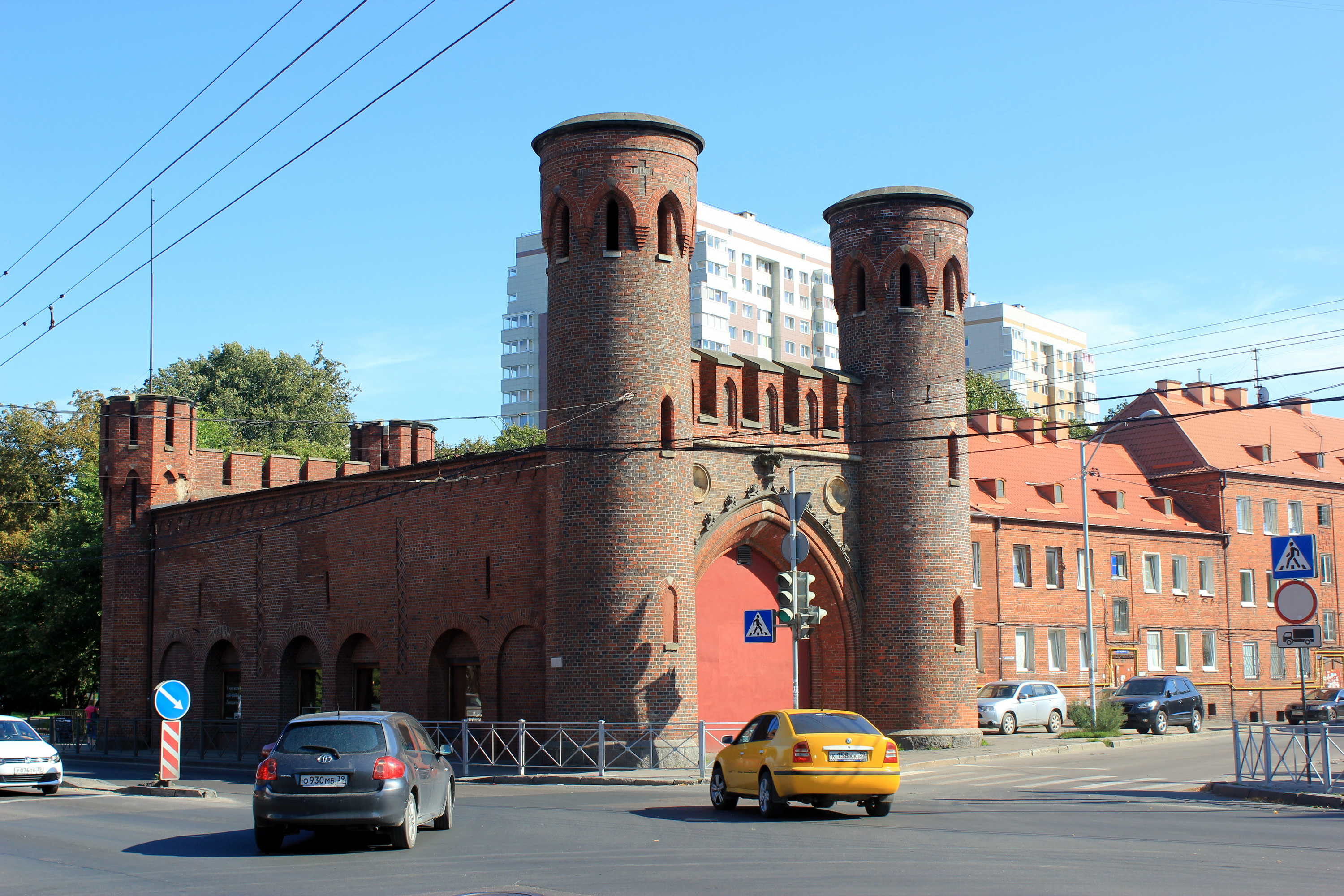 Das Sackheimer Tor in Königsberg (heute Kaliningrad.